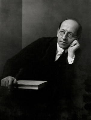 Hermann Clemens Kosel Selbstportrait Photographie 1910.